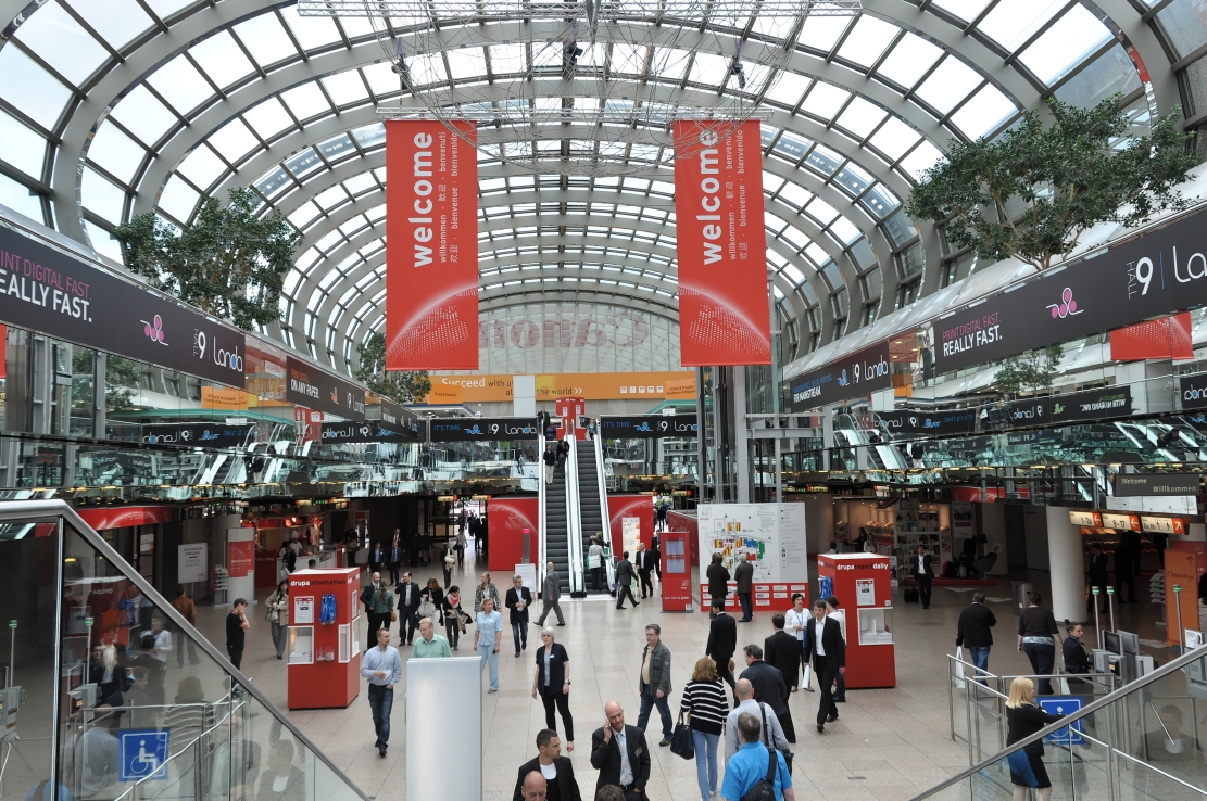 Bilder von der Drupa 2012 Drupa 2012